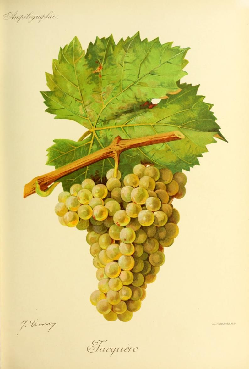 Illustration du cépage Jacquère par Jules Troncy dans l'ouvrage "Ampélographie : traité général de viticulture" publié sous la direction de P. Viala & V. Vermorel avec la collaboration de A. Bacon, A. Barbier, A. Berget [et al.] - Date de l'édition originale : 1901-1910